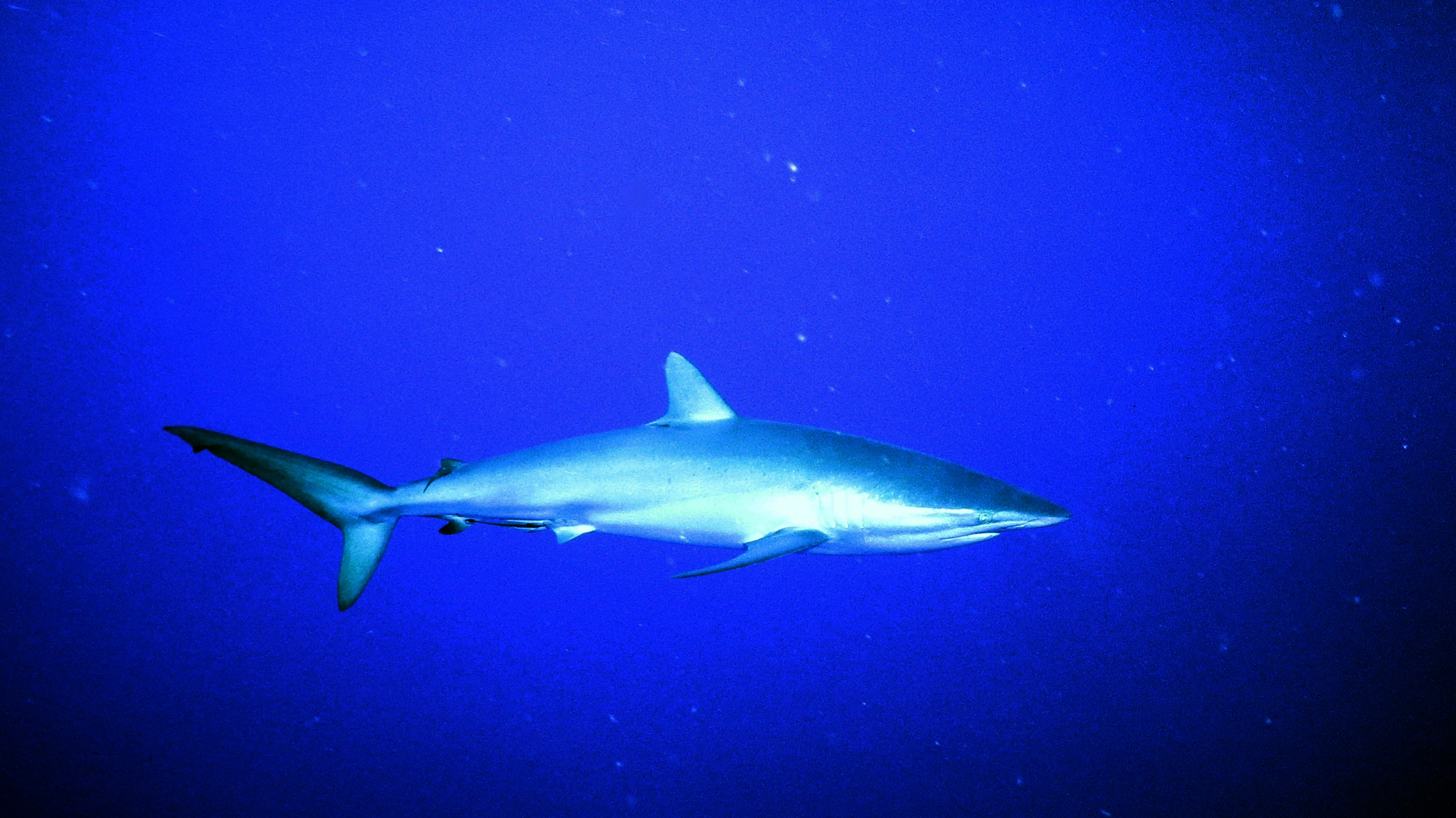 Seidenhai auf Patrouille